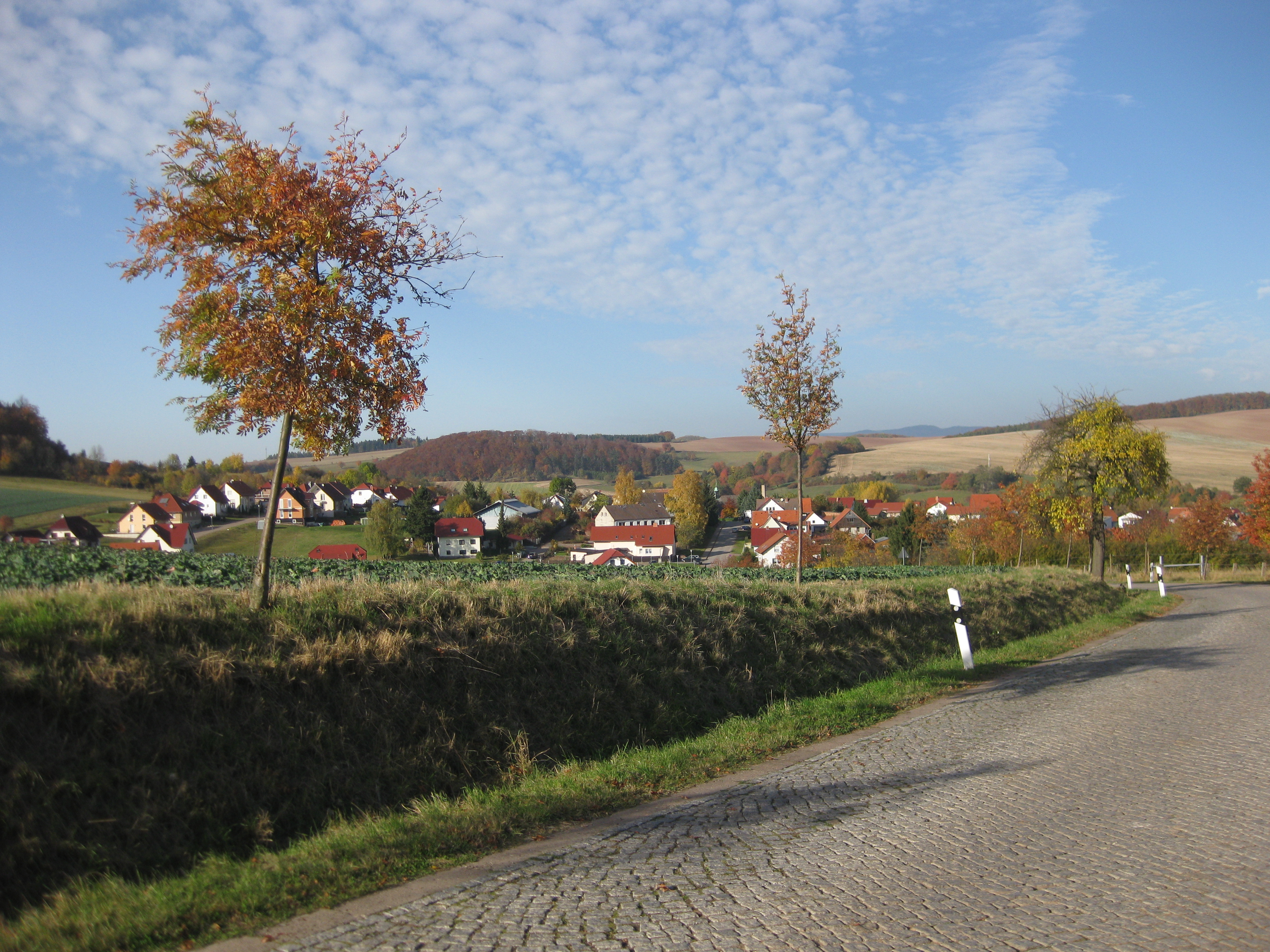 Ansicht von Weißenborn-Lüderode (mit dem Iberg im Hintergrund)